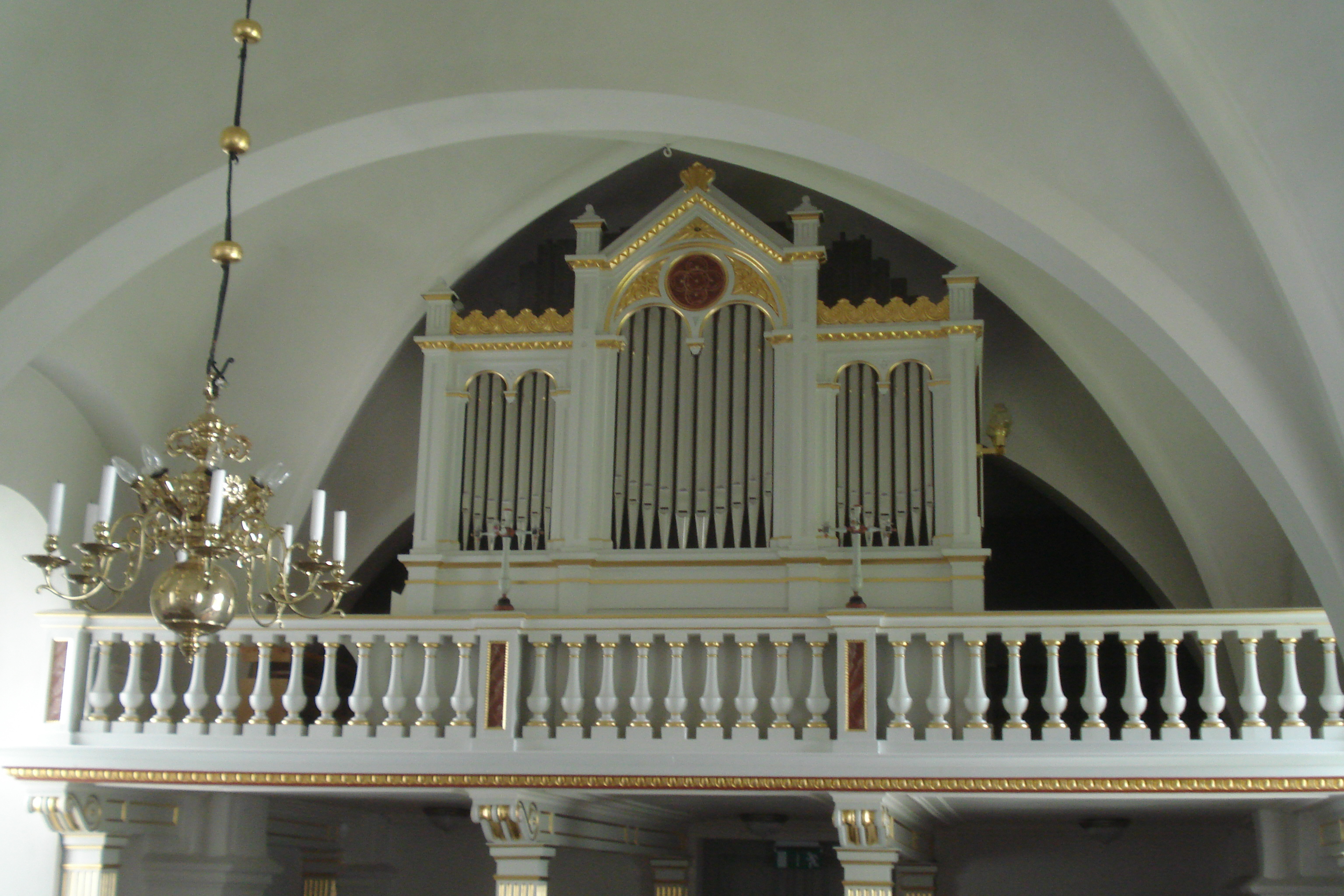 Läktarorgeln i Östra Hargs Kyrka, Östergötland